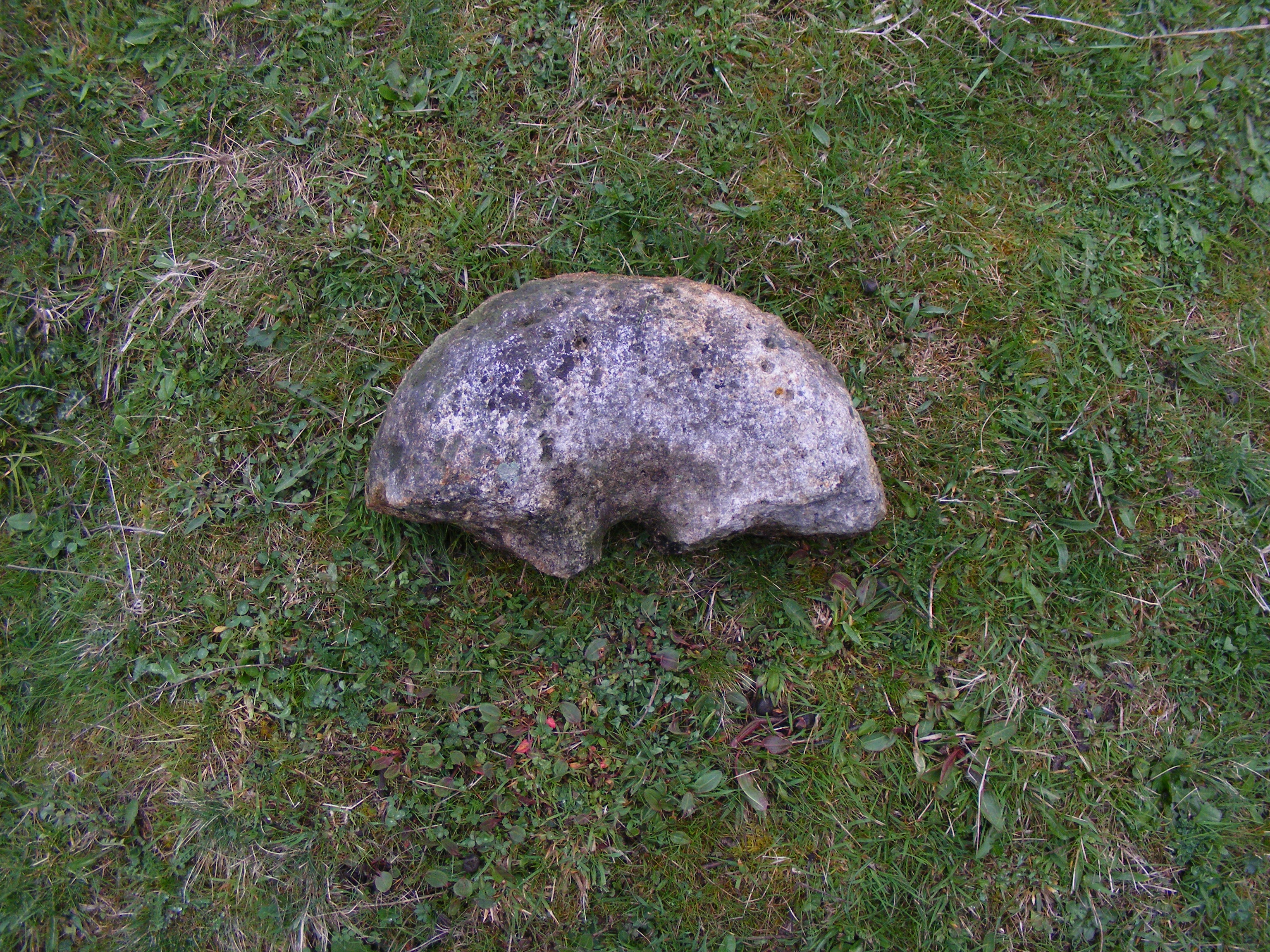 Част от кръгъл камък с отвор в средата, намерен в землището на село Грашево. Най-вероятно част от хромел.